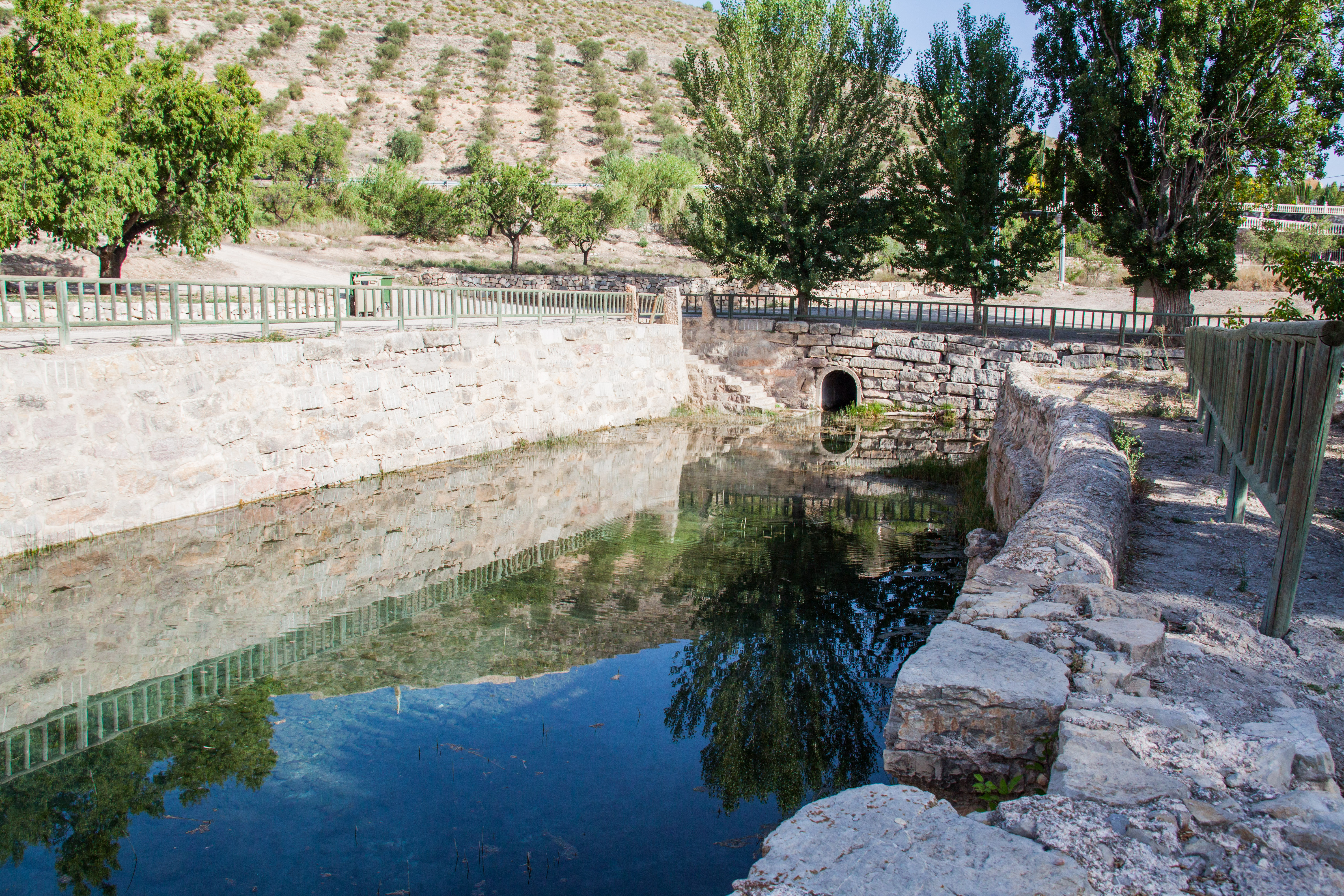 Nacimiento de Agua en Archivel (Caravaca de la Cruz)